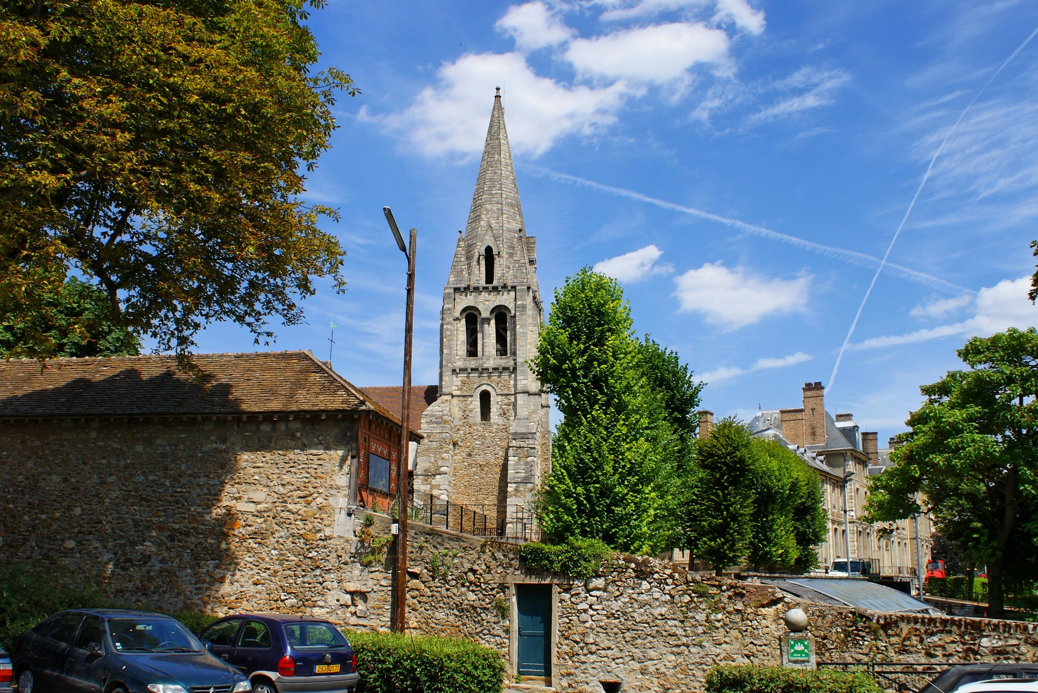 Eglise Saint Denis situé à Athis Mons (91), à proximité de la Mairie. Son cloché roman, datant du XII eme siècle, est classé aux monuments historiques.